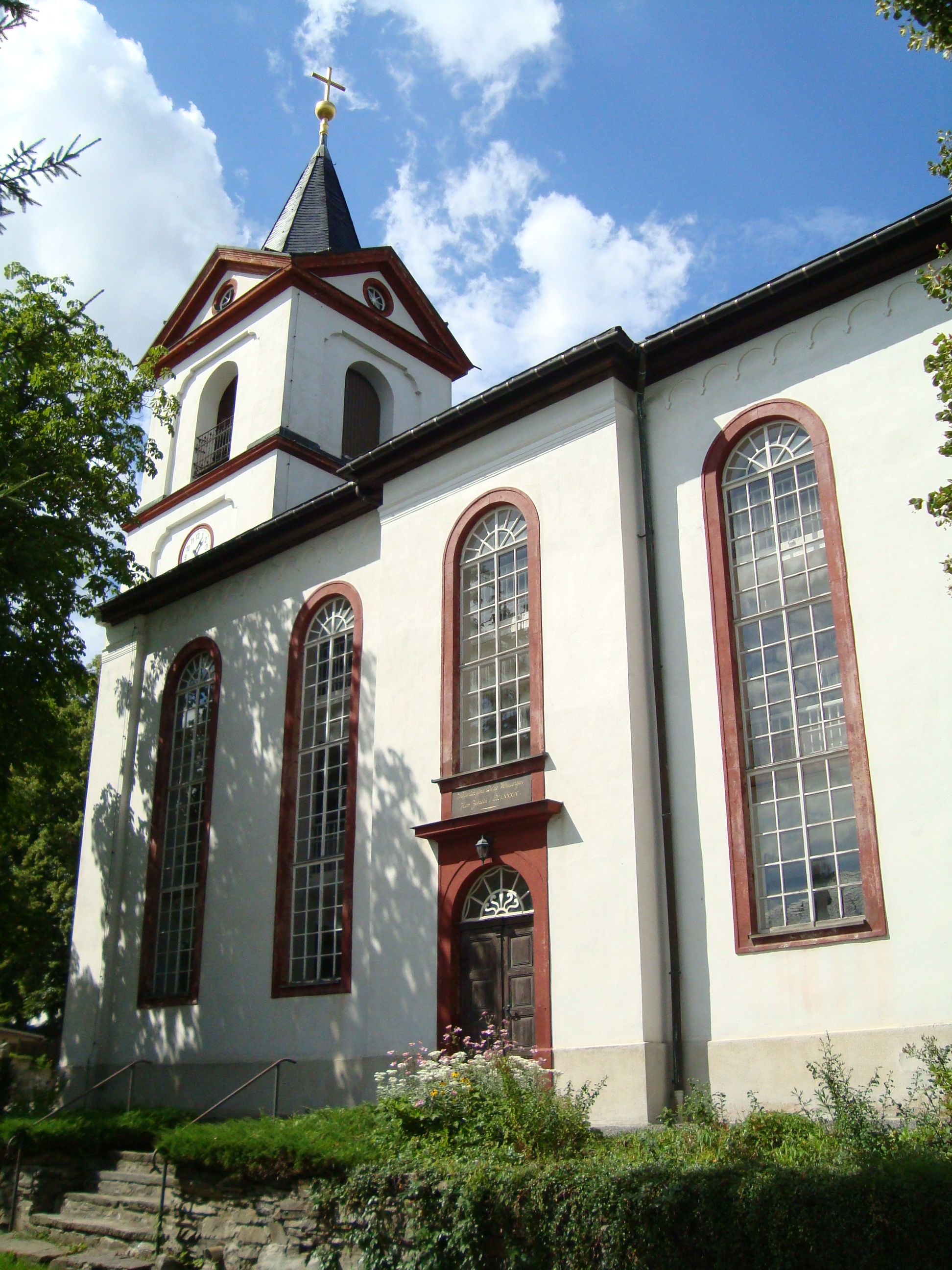 Kirche in Grünhainichen im Erzgebirge